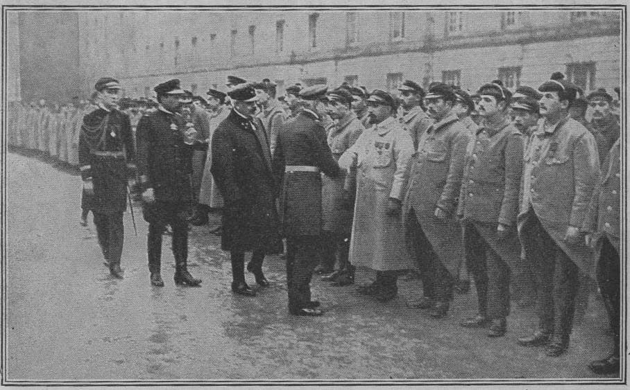 Lacaze, Ronarc'h décorent des fusillers_marins ayant servi à Dixmude et Nieuport, remise dans la caserne_de_la_pépinière. L'on peut aussi voir le capitaine de vaisseau du Merle.